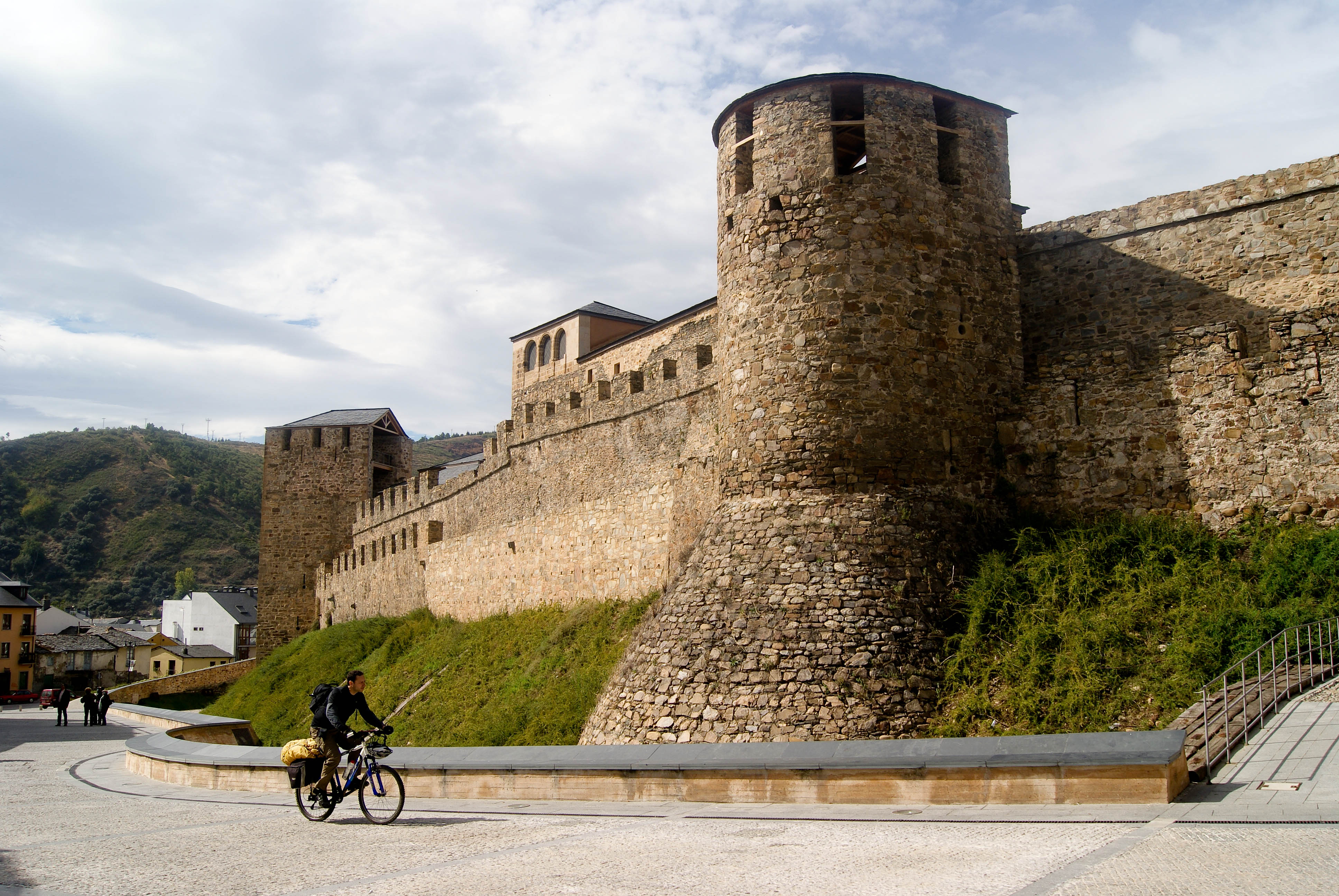 El castillo templario de Ponferrada, se encuentra en la ciudad de Ponferrada, comarca de El Bierzo, Provincia de León, Comunidad Autónoma de Castilla y León, España se sitúa sobre una colina en la confluencia de los ríos Boeza y Sil. Época de construcción 1178 Construido por la Orden del Temple